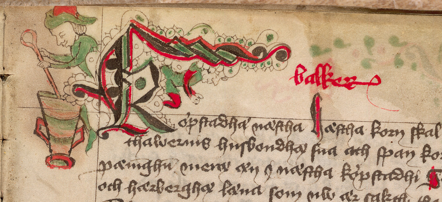 Detalj ur handskriften